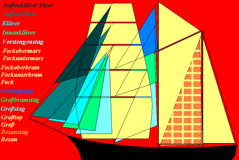 Segelplan des Segelschulschiffes "Kaliakra"